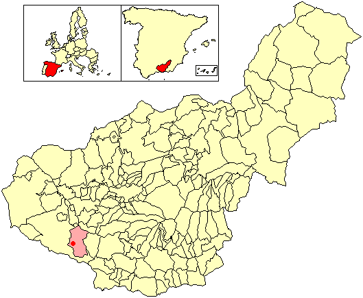 Situación del término municipal de Játar respecto a la provincia de Granada, en España.